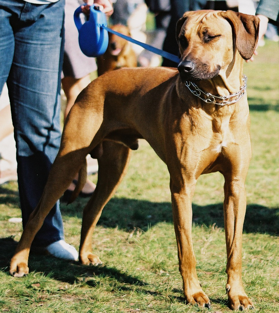 Rhodesian Ridgeback autor: Pleple2000